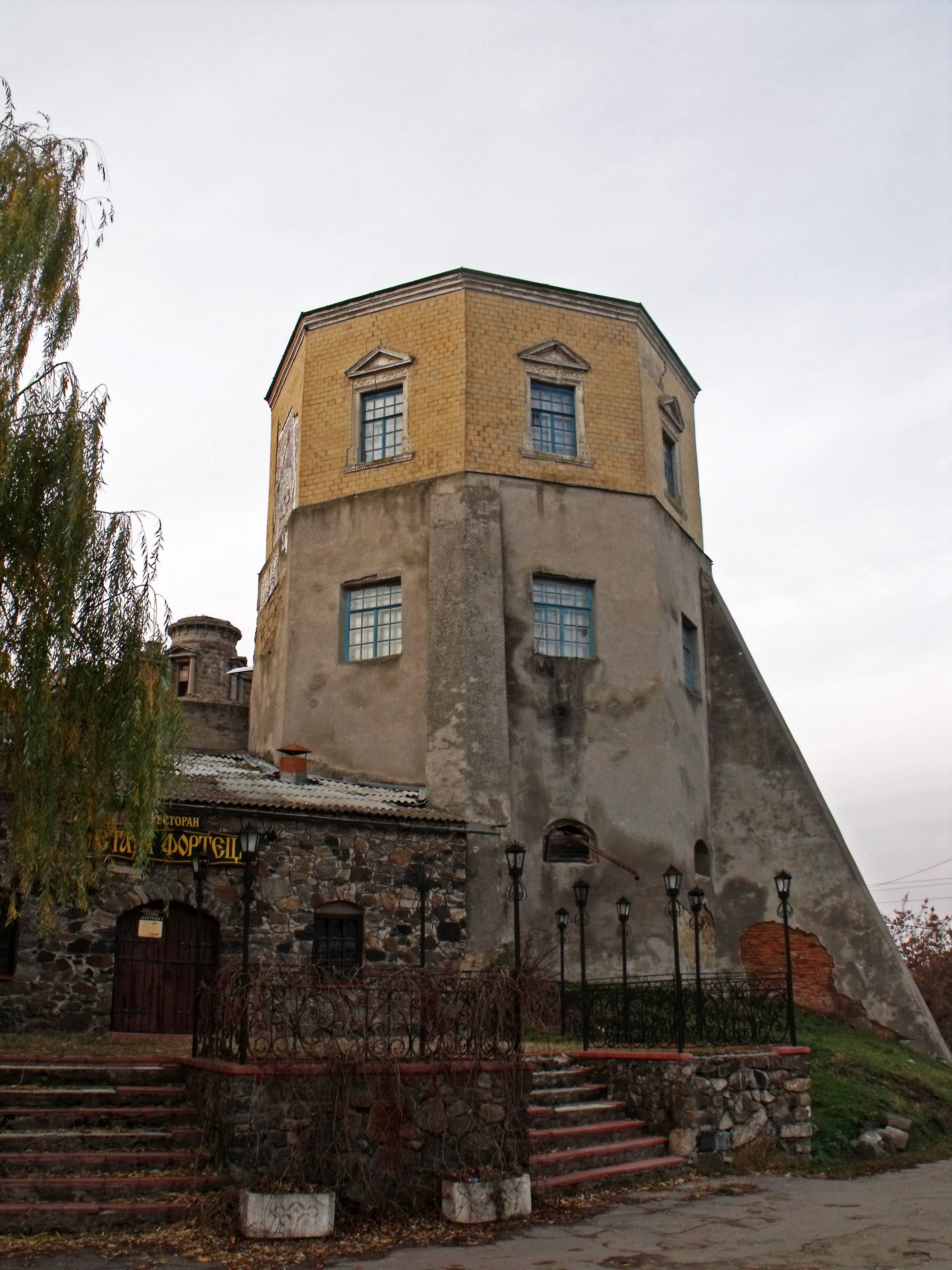 Садиба - Башта замку, Хмільник, вул. Шевченка,1